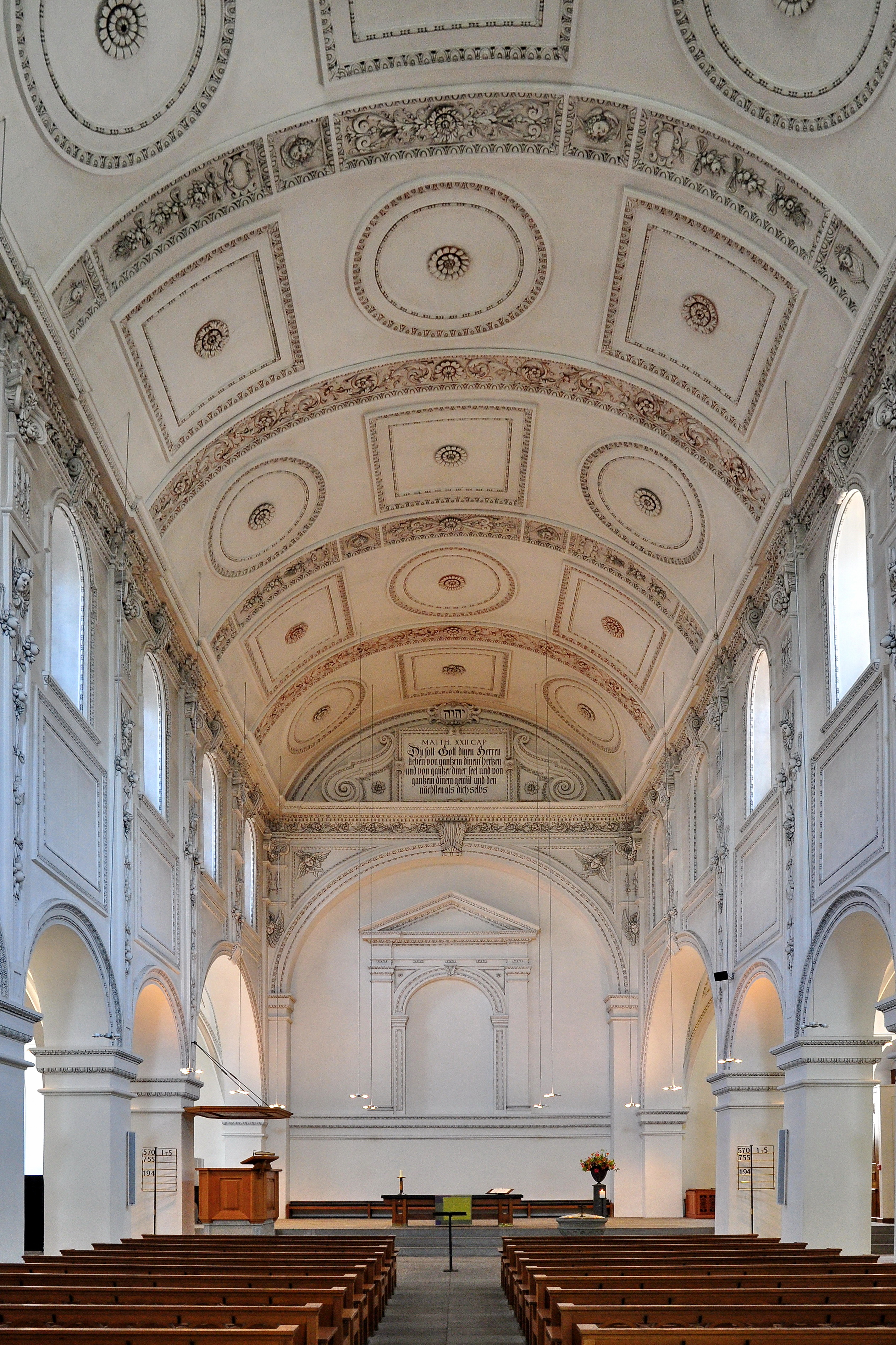 Predigerkirche in Zürich (Switzerland)